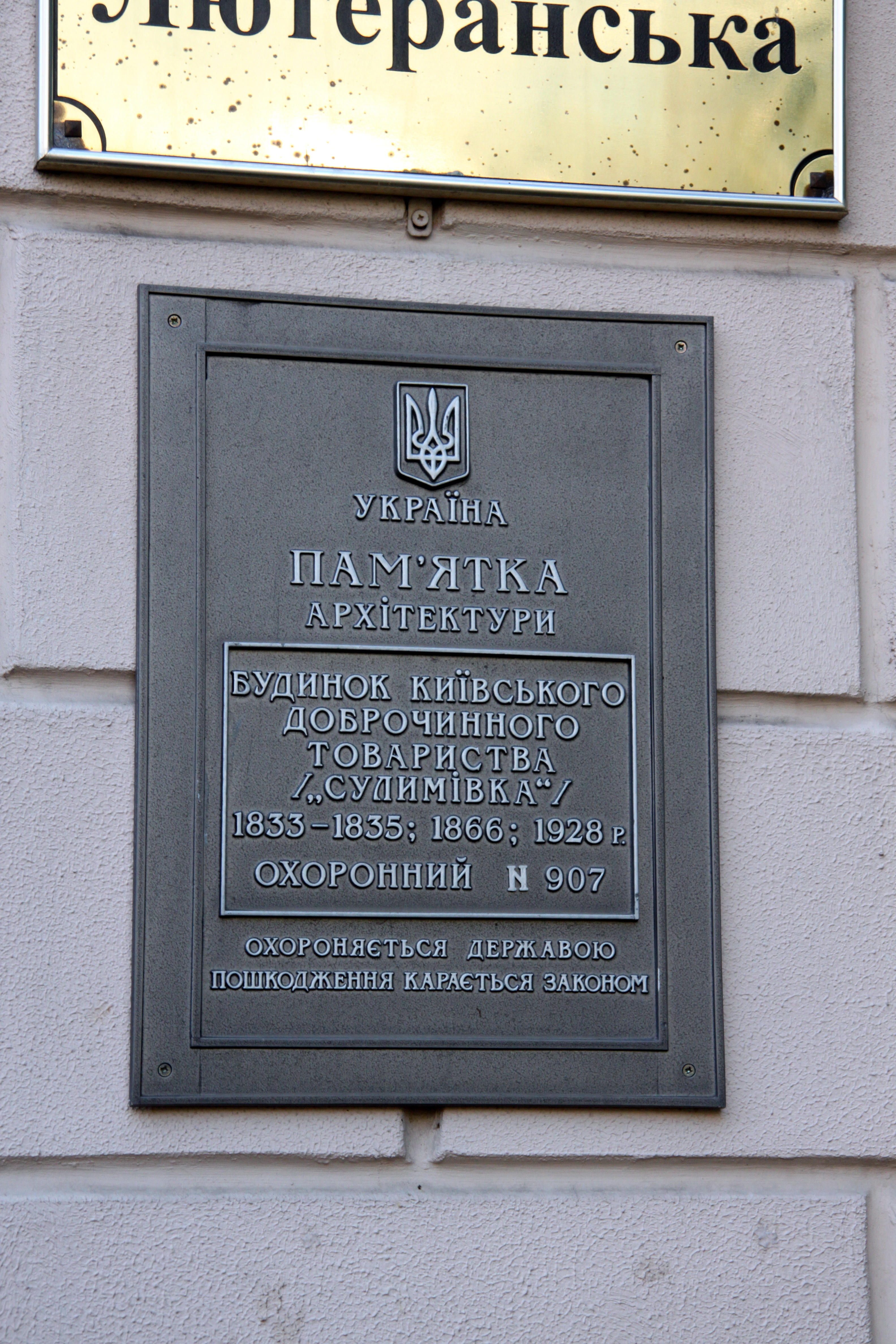 Будинок Київського доброчинного товариства («Сулимівка»), Київ, Лютеранська вул., 16